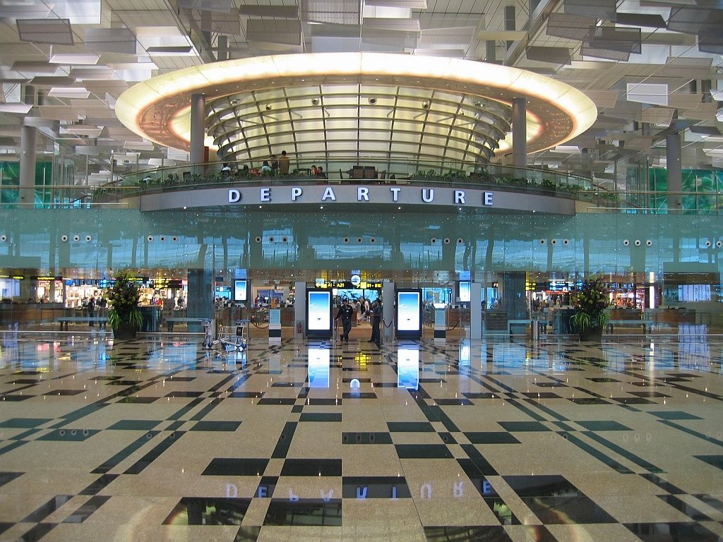 Flughafen Singapur - Abflughalle Terminal 3